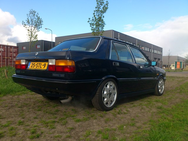 1985 Lancia Prisma 1600 serie 1